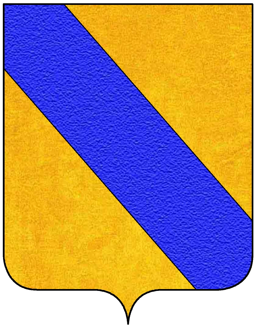 Stemma della famiglia Morosini, appartenente al patriziato di Venezia.